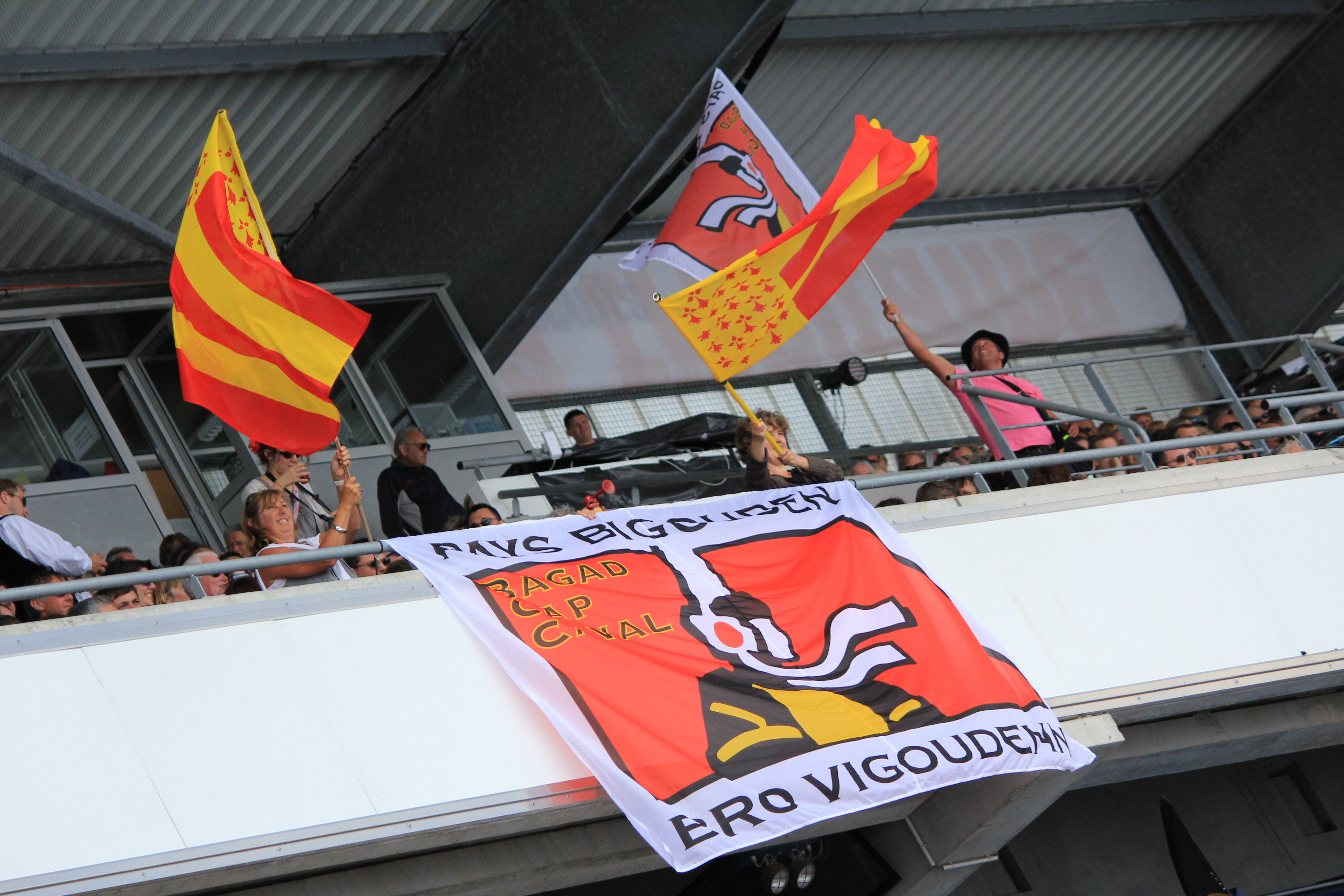 Supporteurs du Bagad Cap Caval lors de l'épreuve d'été du championnat national de bagadoù de 1ère division, organisé dans le cadre du Festival interceltique de Lorient, France.